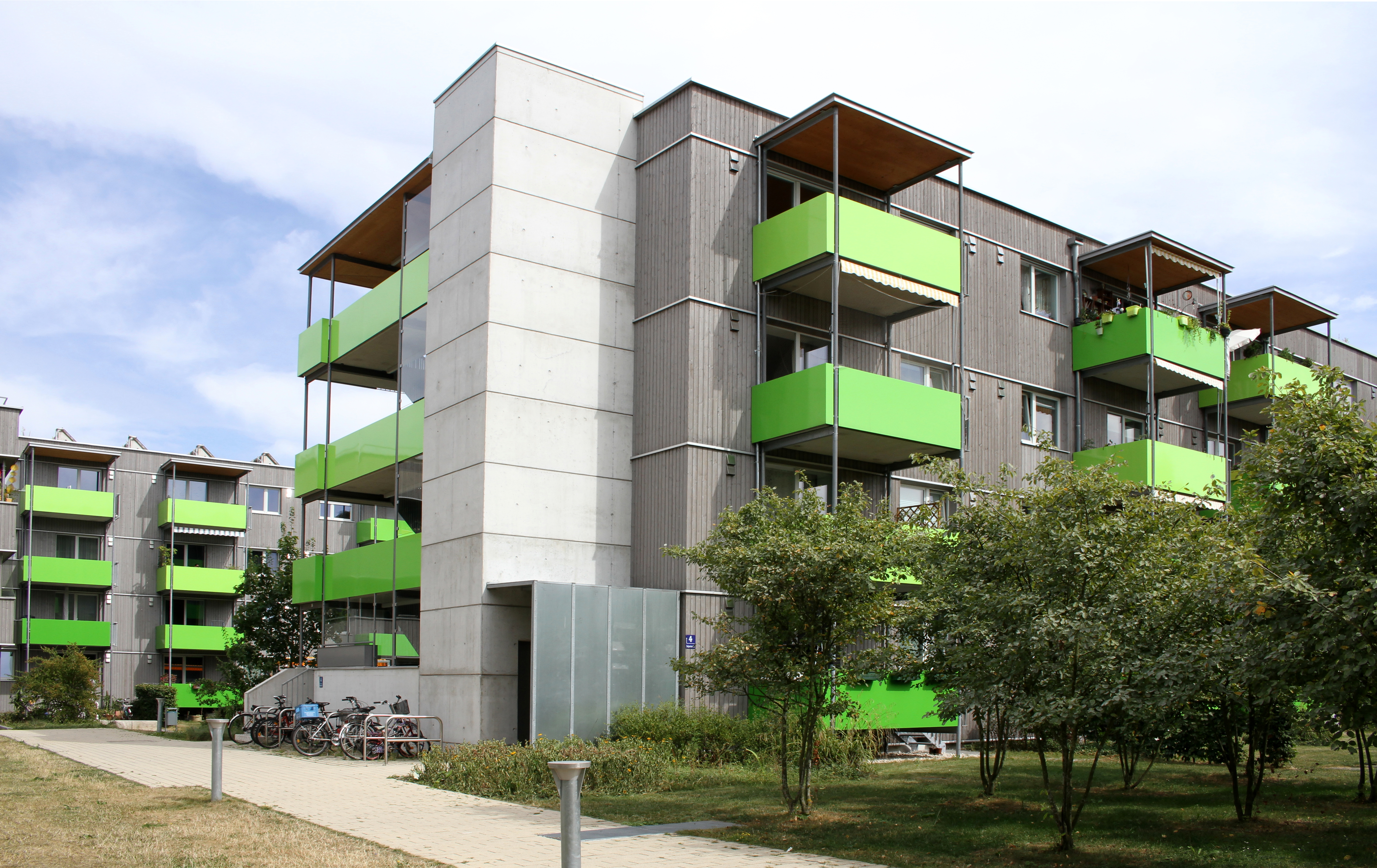 Sanierte Genossenschafts-Wohnanlage der GWG. München, Sendling-Westpark